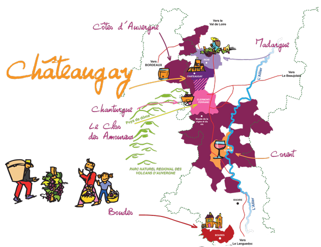 Carte représentant la répartition des principaux crus Côtes d'Auvergne